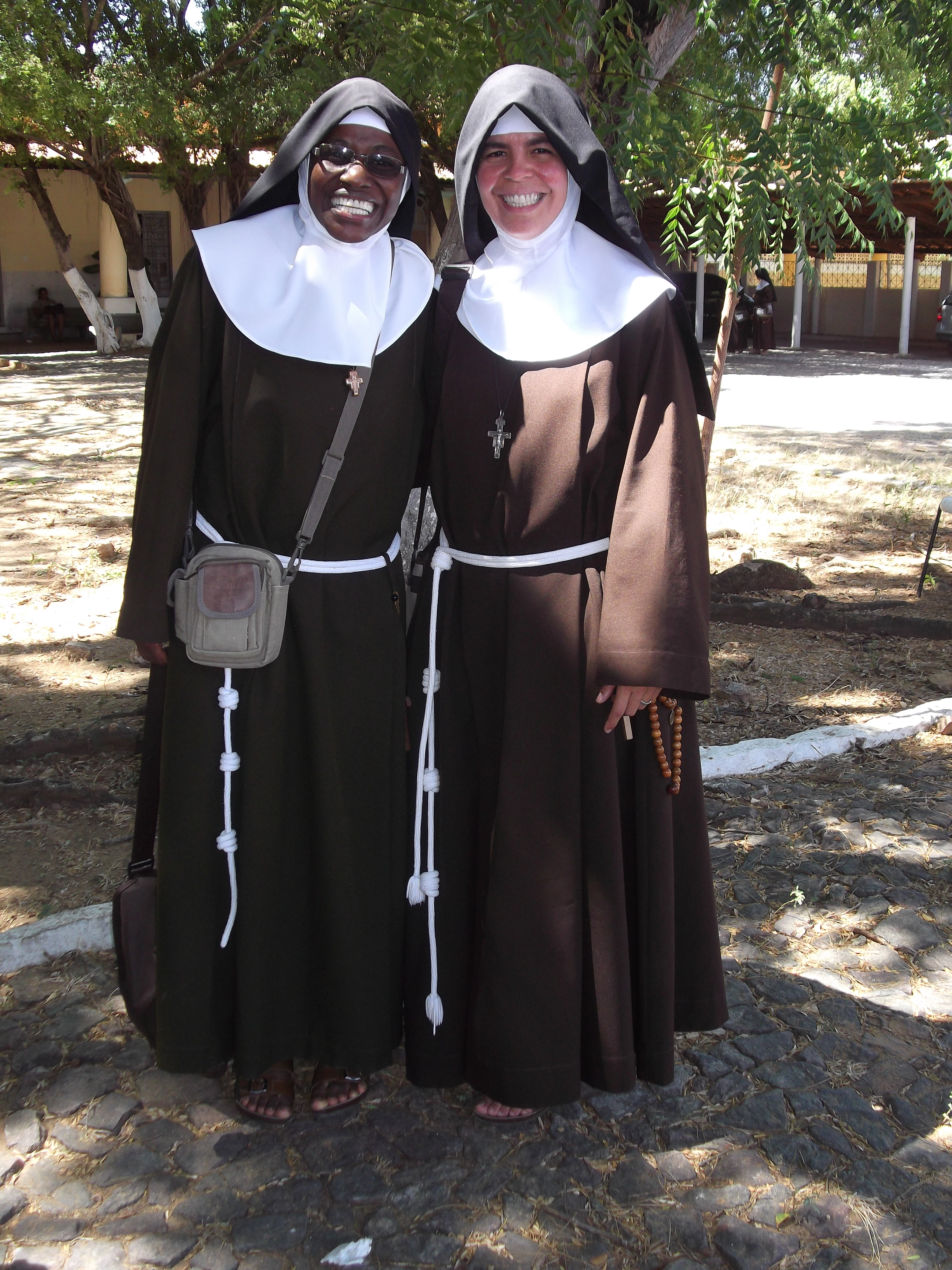 Clarissas do Mosteiro Imaculada Conceição da Mãe de Deus, Feira de Santana, Bahia, Brasil